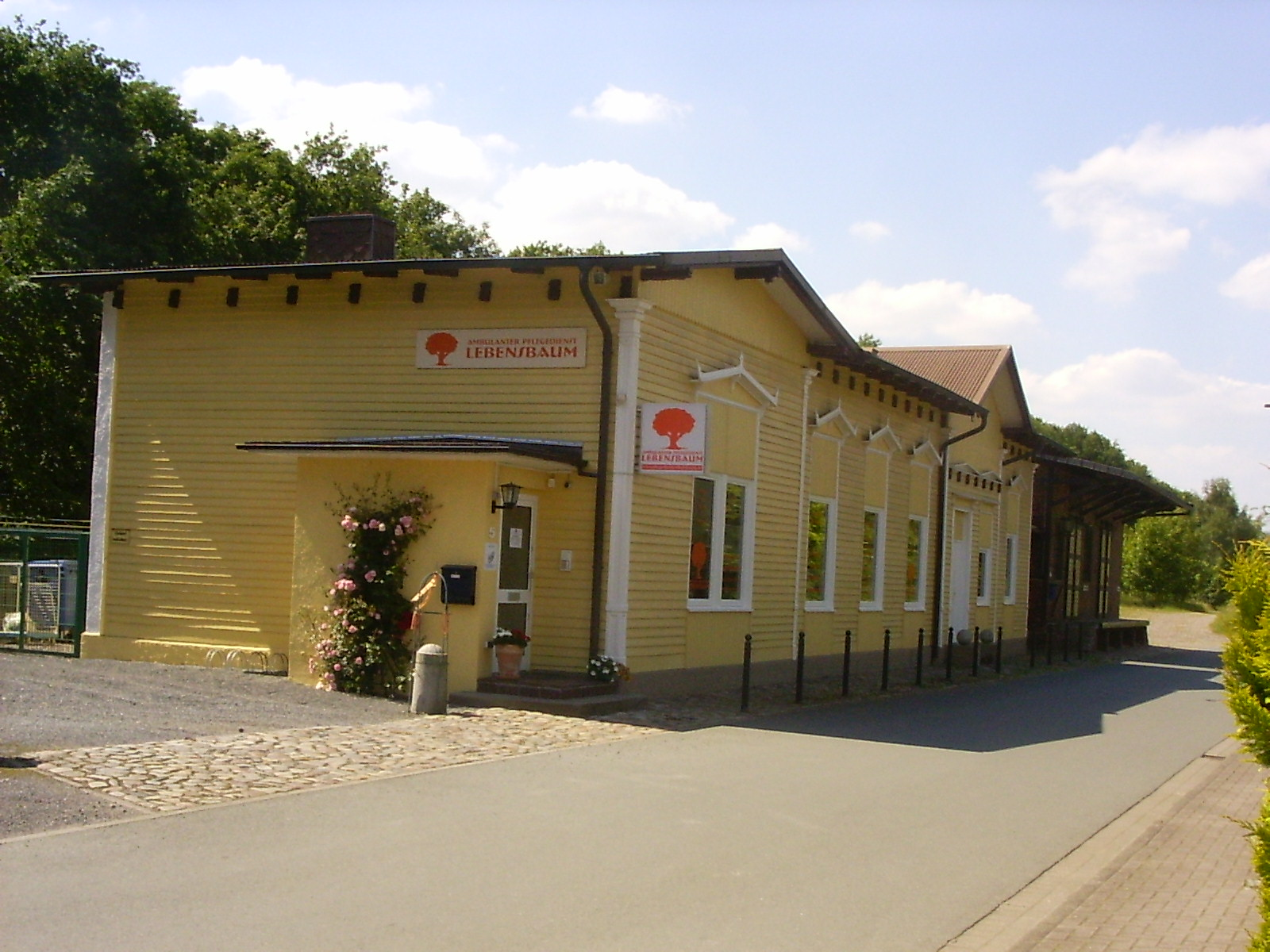 Hollenstedt, station, hoofdgebouw